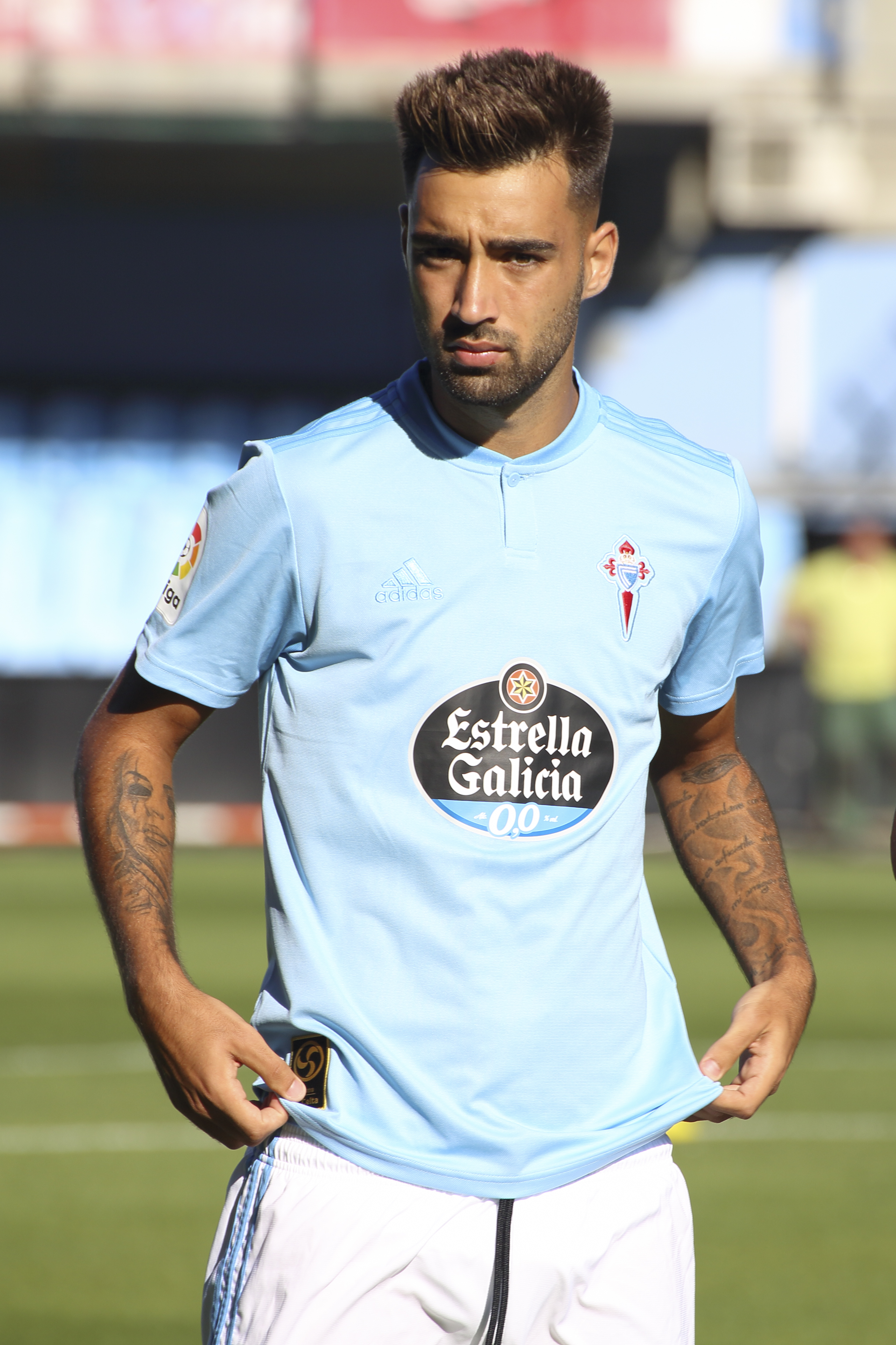 Presentación RC Celta - Temporada 18/19